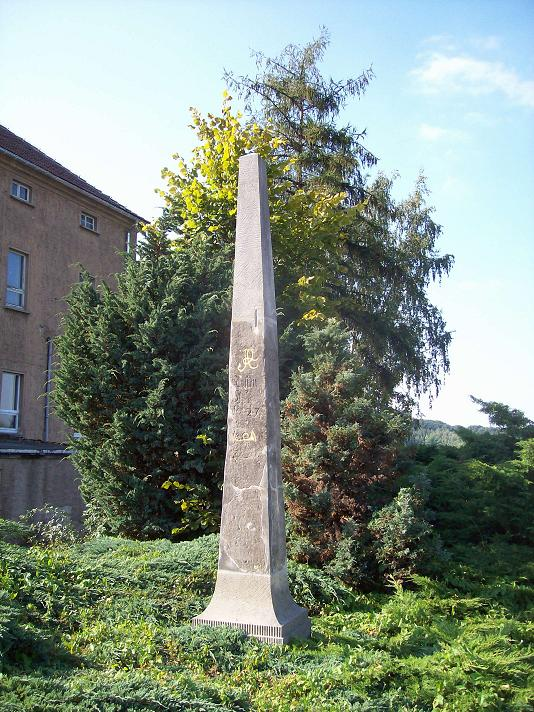 Kursächsische Ganzmeilensäule Altzella